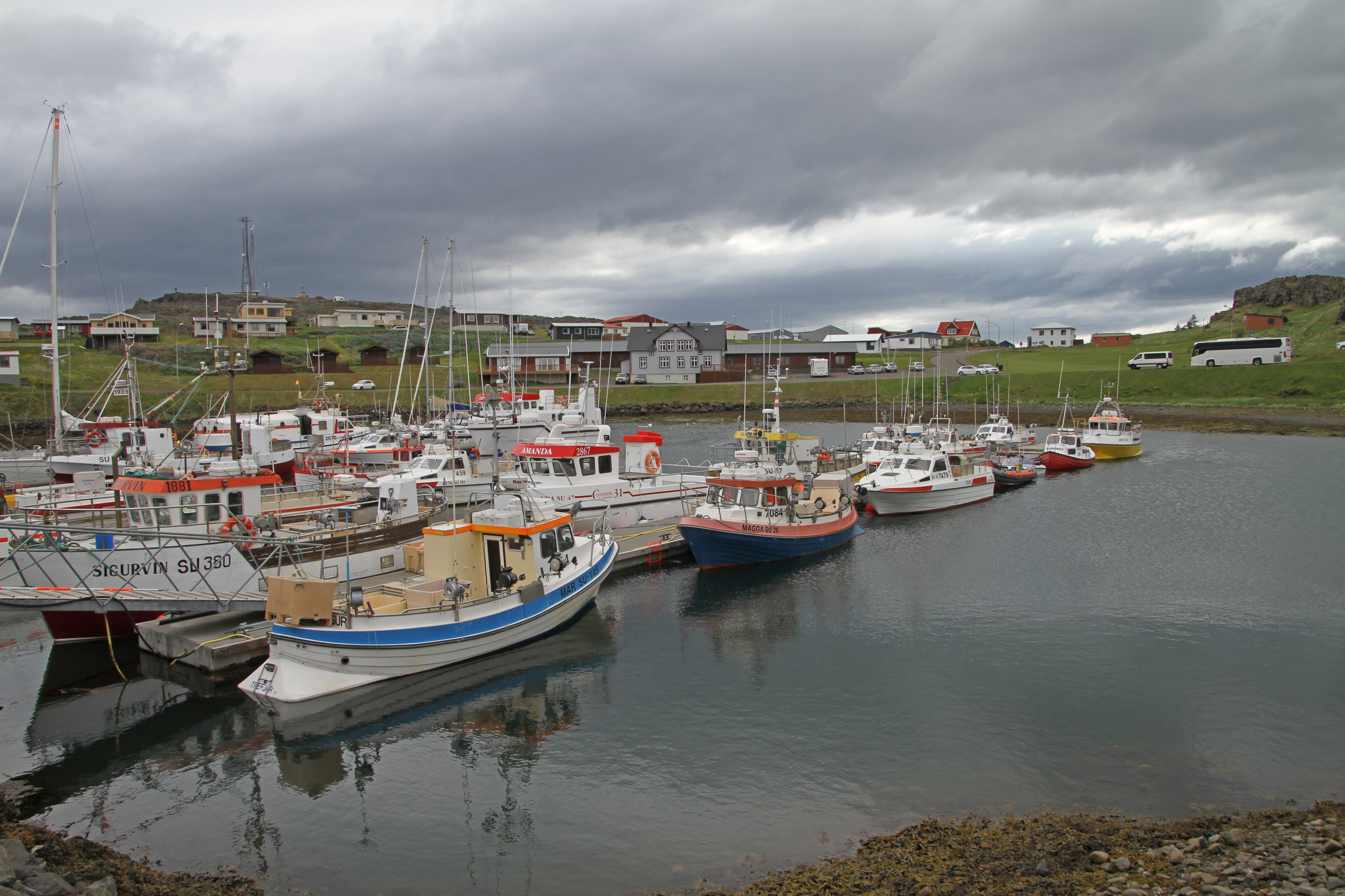 Djúpivogur in Island